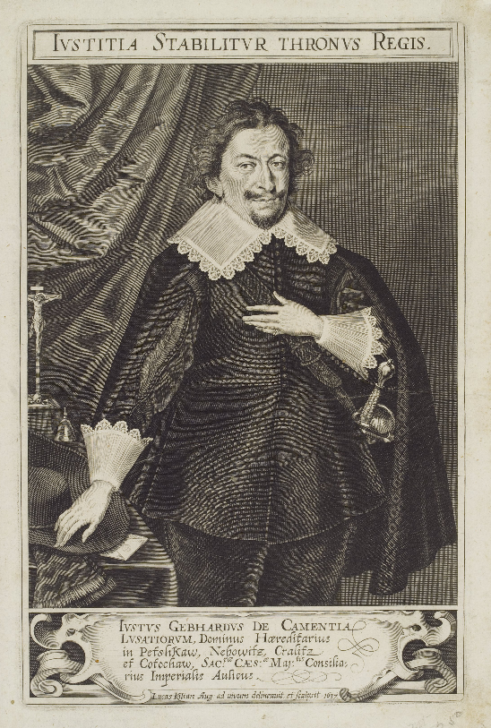 Depicted person: Justus von Gebhard (1588–1656), Jurist und Gesandter von Kaiser Ferdinand II.